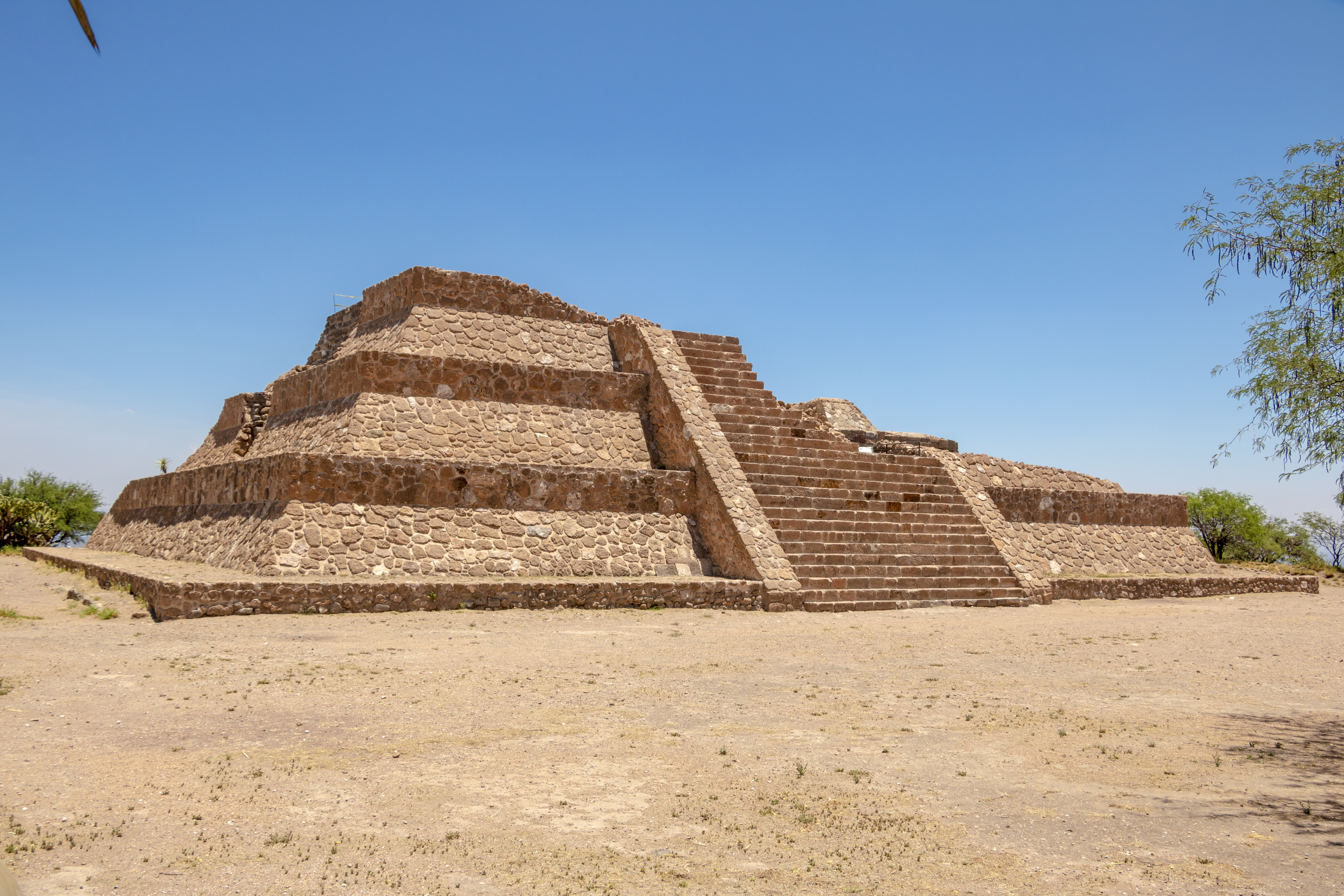 Zona arqueológica de Pahñú o Pañhú en el municipio de Tecozautla, Hidalgo en México. Templo a Xiuhtecutli - Huehueteotl.